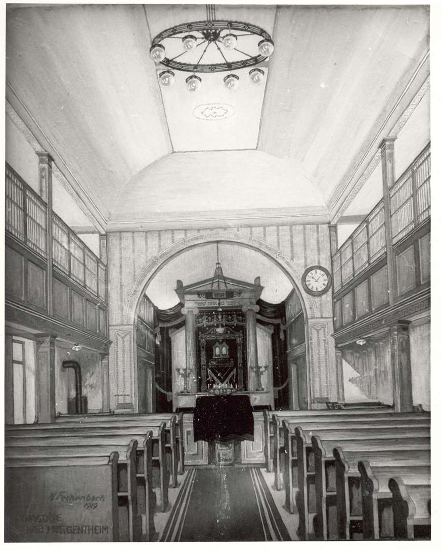 Synagoge (Bad Mergentheim), Zeichnung von Hermann Fechenbach 1919 Nutzungsbedingungen ausdrücklich auch für Wikipedia (siehe: [1]